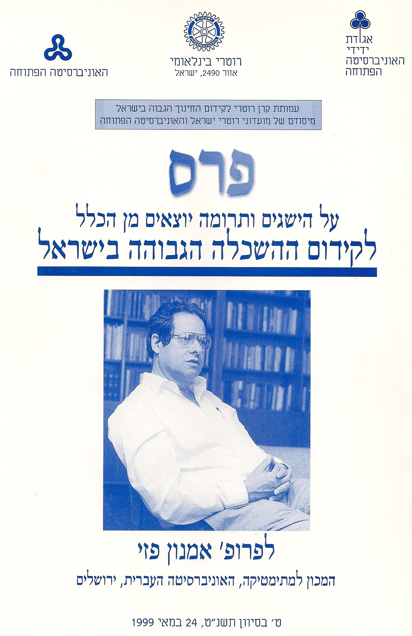 אמנון פזי